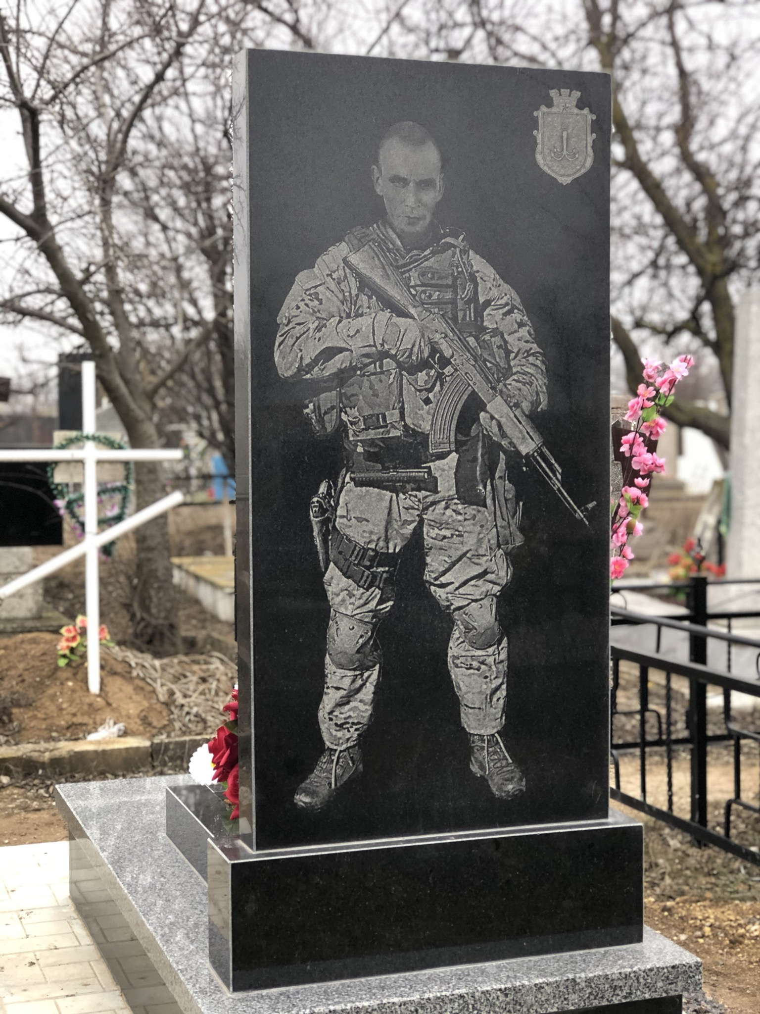 Фото пам’ятника Платонову Сергію Вікторовичу